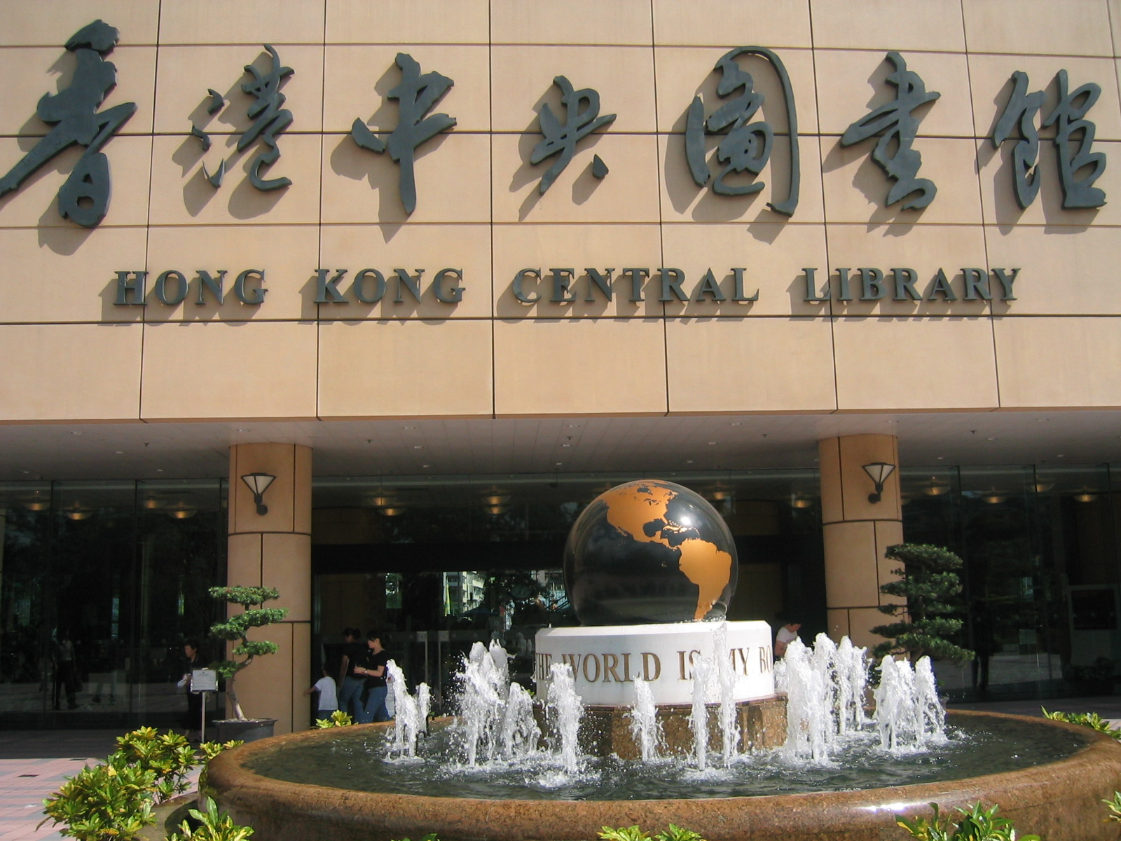 Hong Kong Central Library, Causeway Bay, Hong Kong